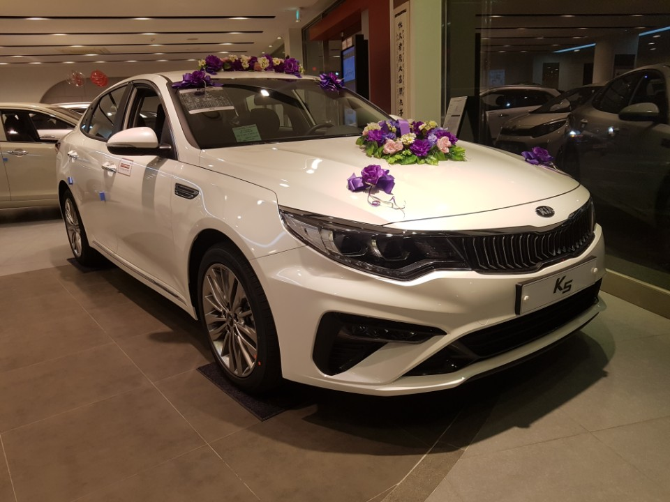 기아 더 뉴 K5(2세대) 정측면